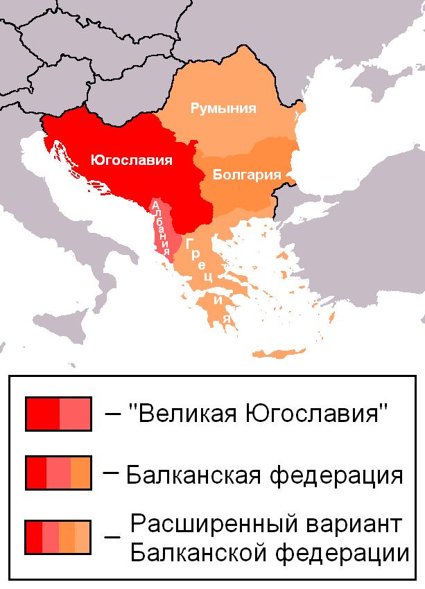 проект Балканской федерации